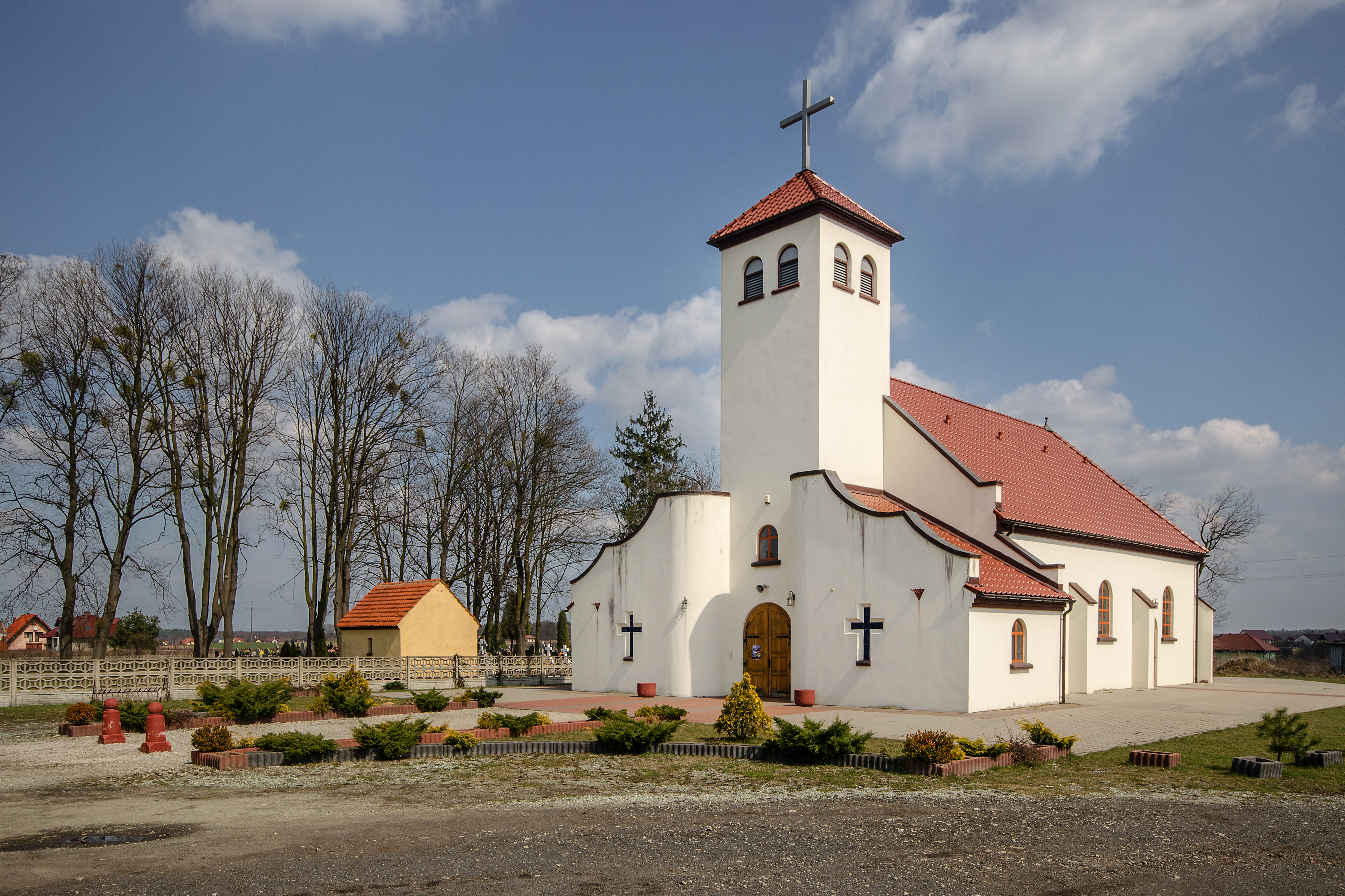 Kaplica mszalna Matki Bożej Częstochowskiej w Krępicach, woj. dolnośląskie, pow. średzki, gm. Miękinia